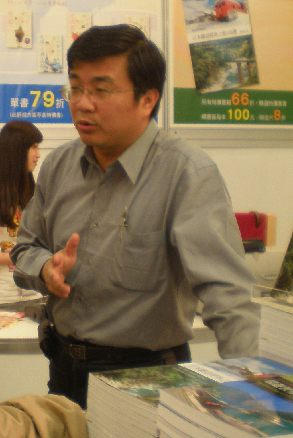 蘇昭旭在2011台北國際書展。